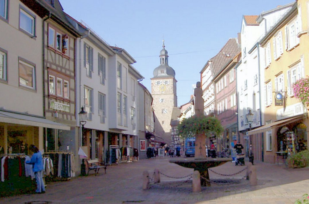 Innenstadt Buchen (Odenwald), Blick auf den Stadtturm